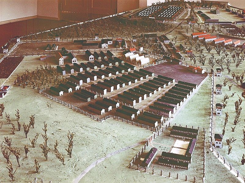 Original image description from the Deutsche Fotothek Weimar-Buchenwald. Nationale Mahn- und Gedenkstätte Buchenwald, Modell des Lagers